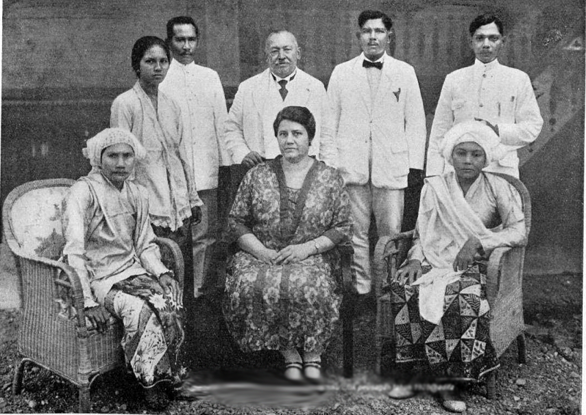 Jenderal Swart dan Teuku Johan Alamsyah berfoto bersama keluarga